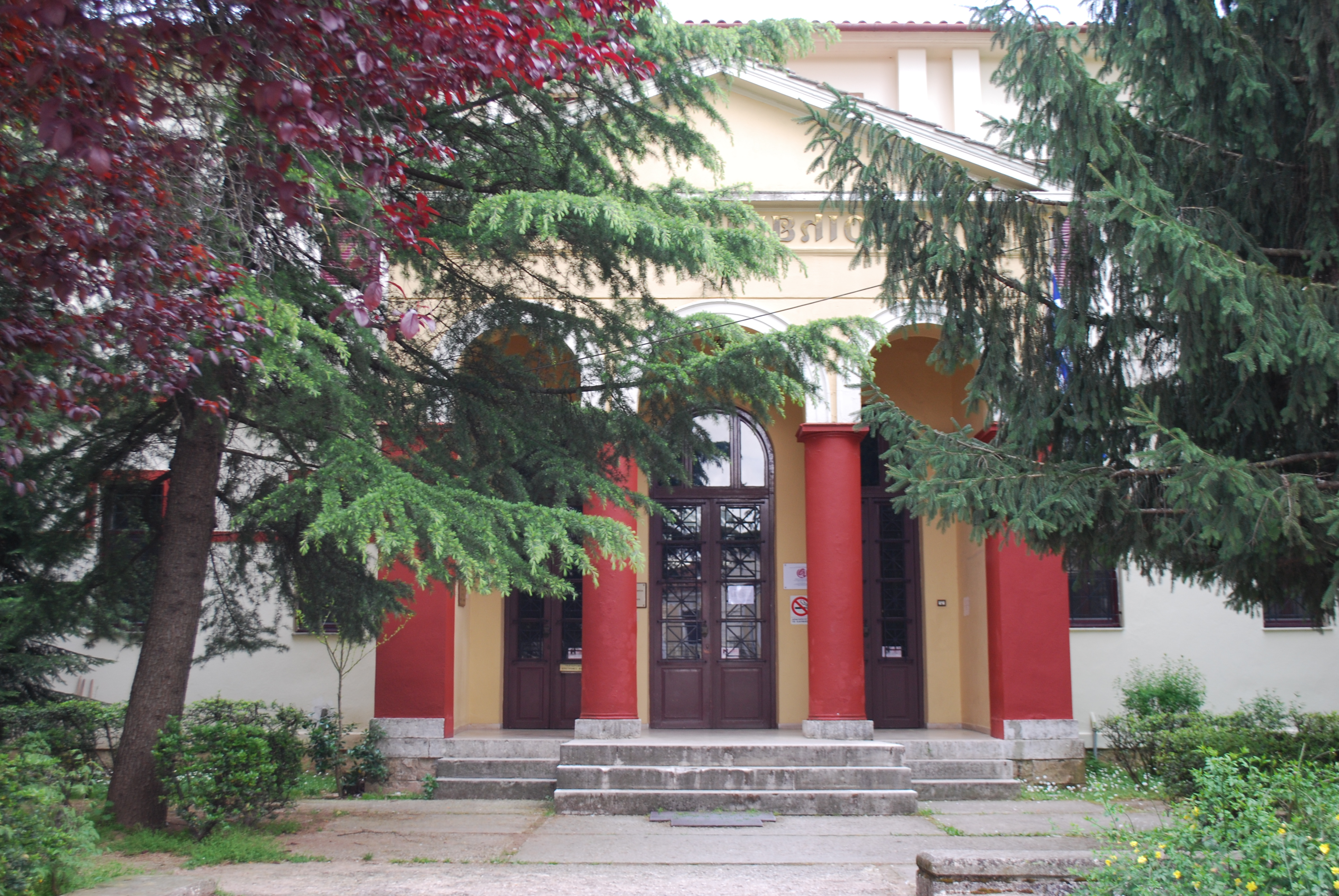 Vue de Ioannina.